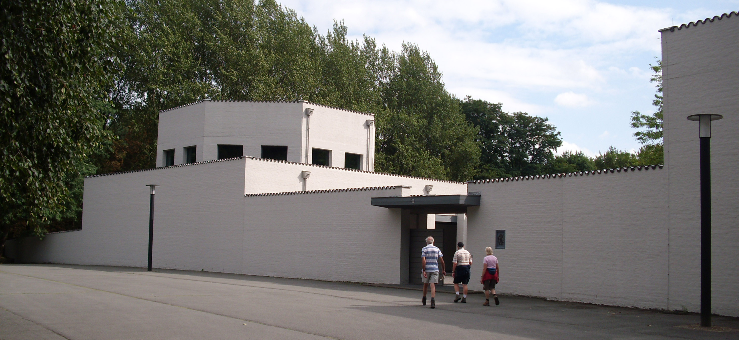 Abdij van Roosenberg - Waasmunster - Waasland - Oost-Vlaanderen - Vlaanderen - België